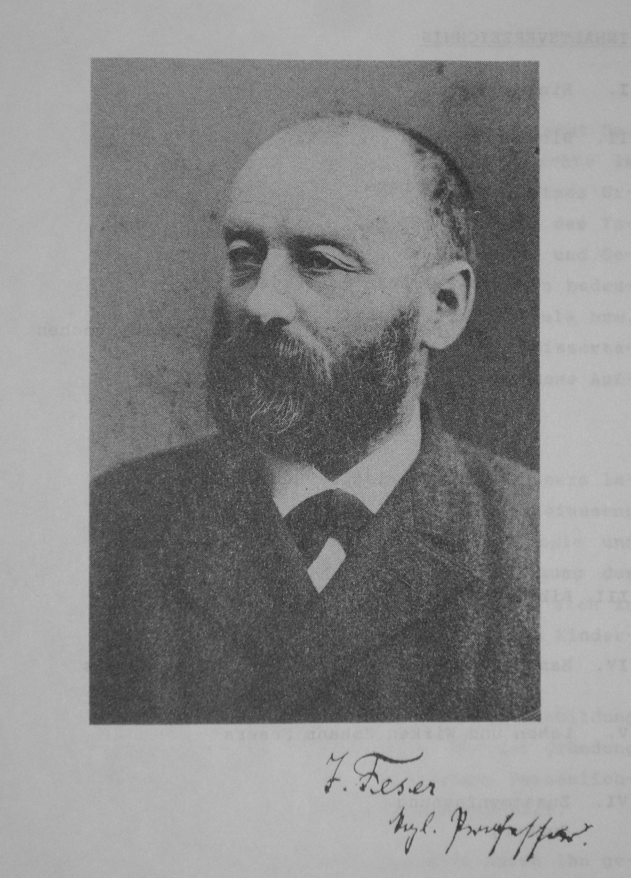 Johann Feser (1841–1896), deutscher Veterinär und Mikrobiologe